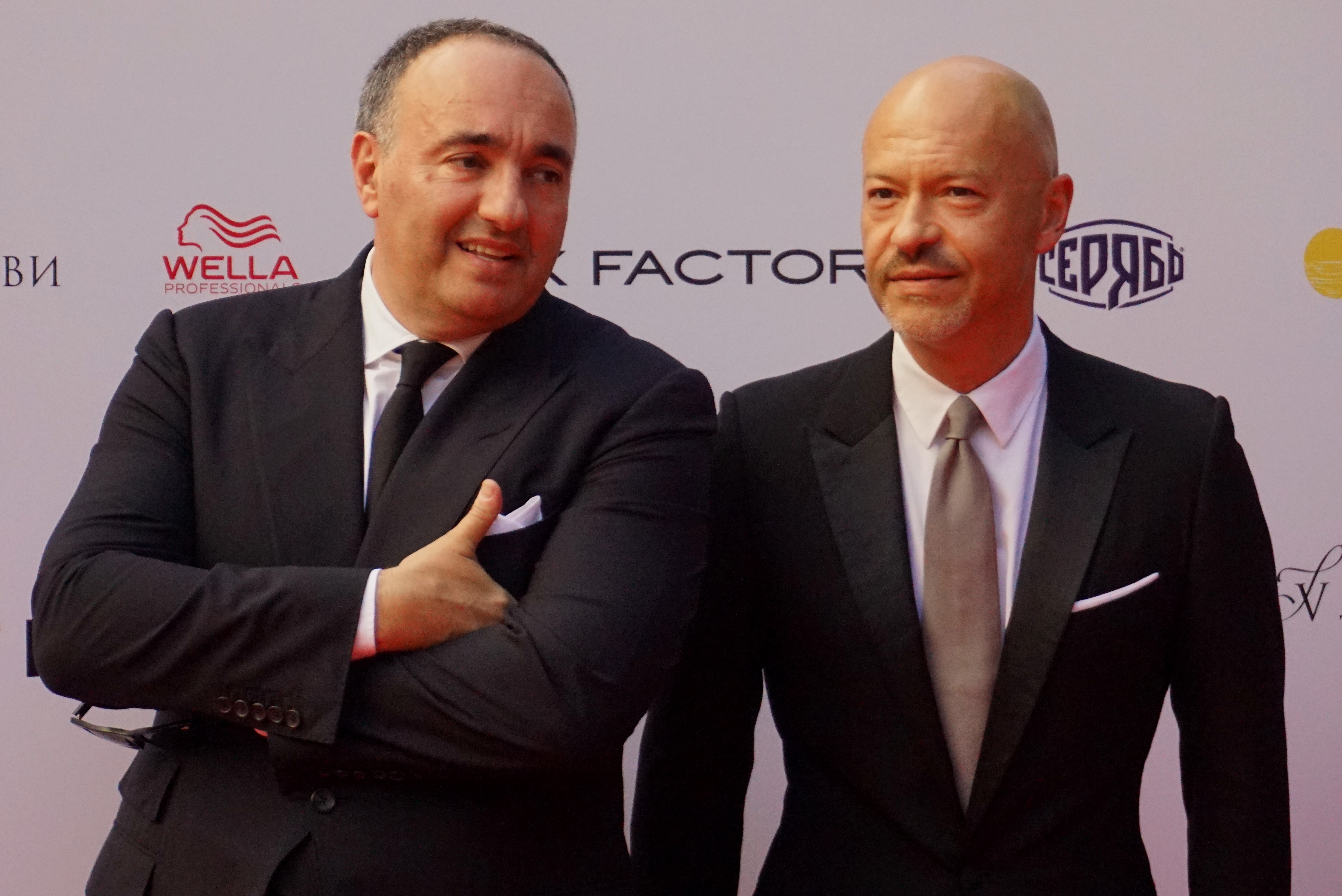 Алекса́ндр Ефи́мович Родня́нский (род. 2 июля 1961, Киев, Украина) — украинский режиссёр, продюсер и медиа-менеджер, основатель телеканала «1+1» и Фёдор Серге́евич Бондарчу́к (род. 9 мая 1967, Москва) — советский и российский продюсер кино и телевидения, кинорежиссёр, киноактёр, телеведущий, клипмейкер, ресторатор. Кинотавр, Сочи, 2016